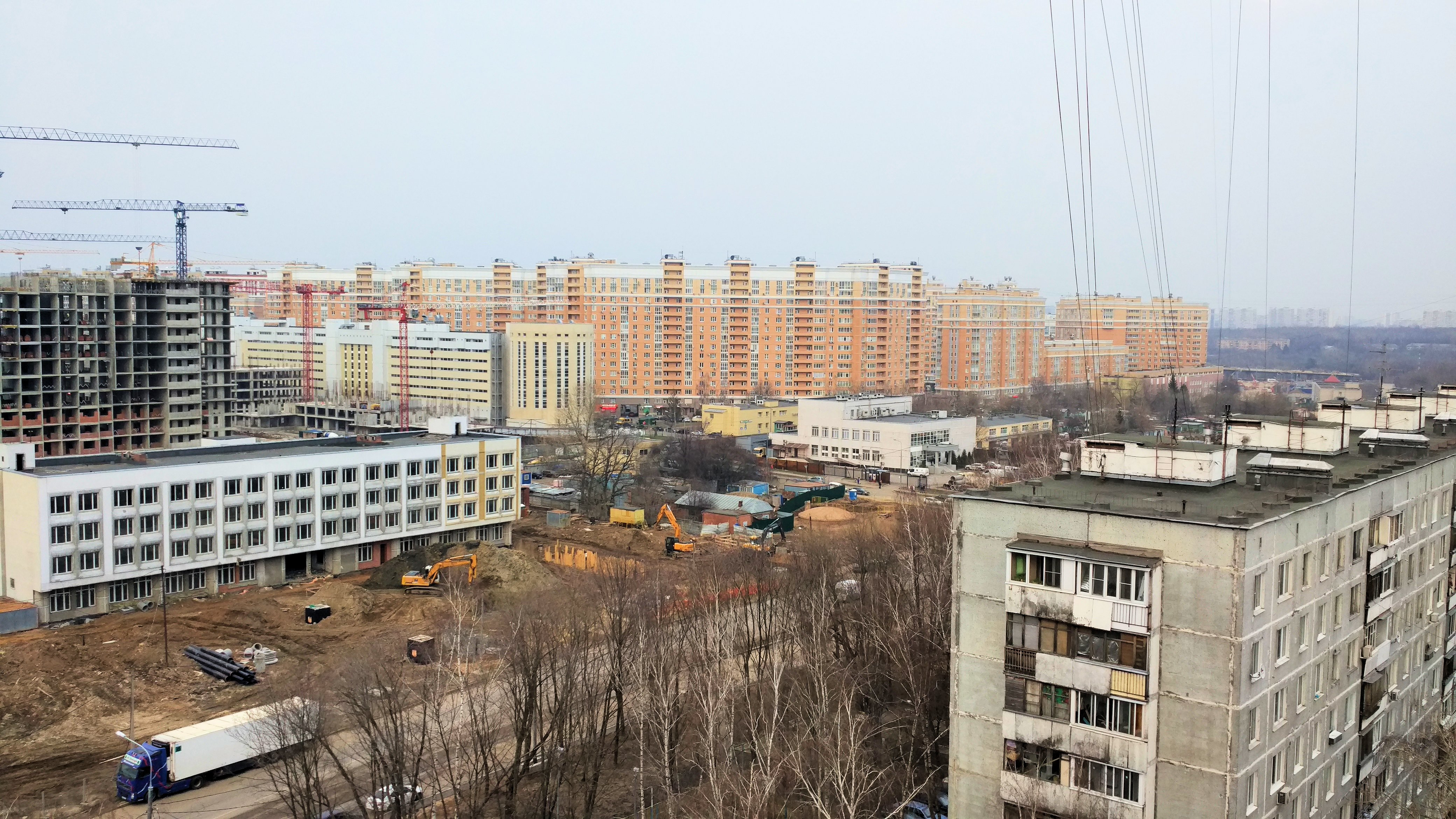 Микрорайон Царицыно в Бирюлево Восточном